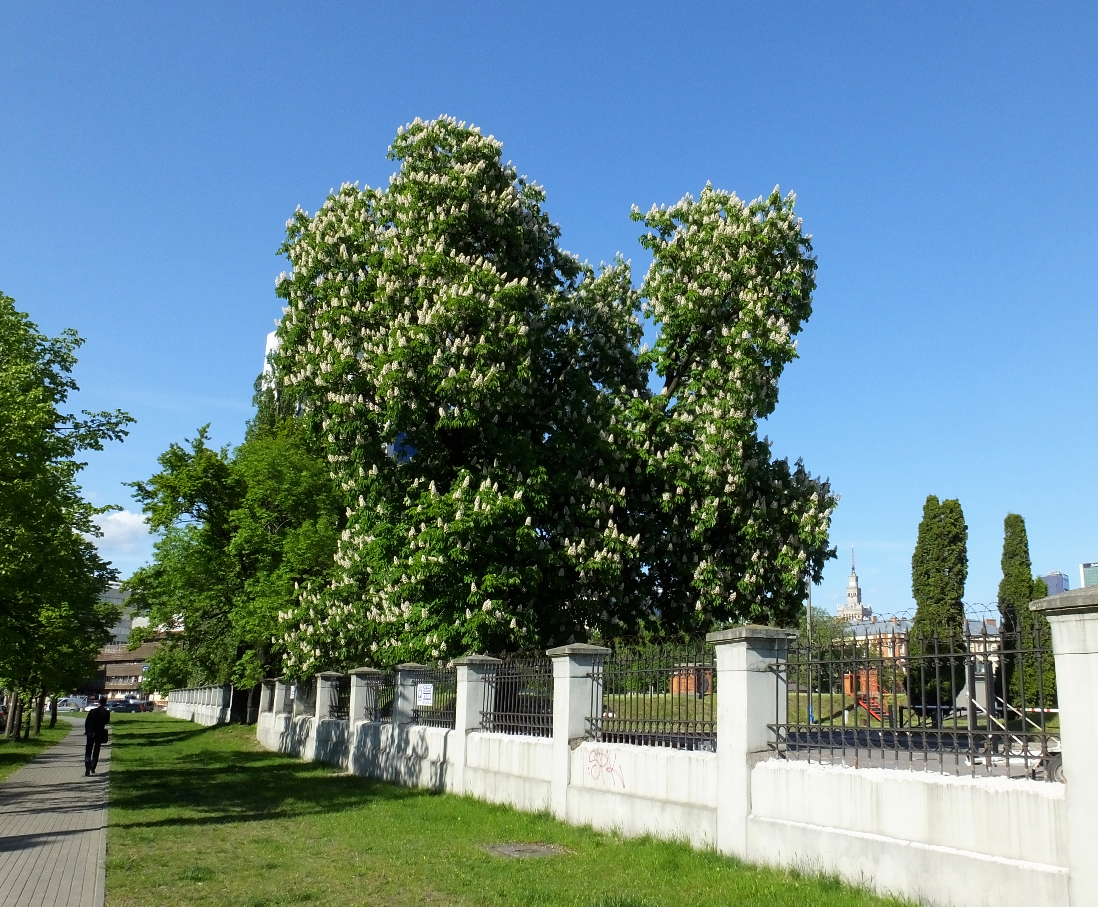 Pomnikowy kasztanowiec zwyczajny przy ulicy Raszyńskiej w Warszawie, obszar Filtrów Lindleya (nr 135 w Warszawie wg Załącznika do rozporządzenia Wojewody Mazowieckiego Nr 24 z dnia 31 lipca 2009r. (Dz.Urz.Woj.Maz. Nr 124, poz. 3639)) This photograph shows a natural monument of Poland registered under number 135 (list)